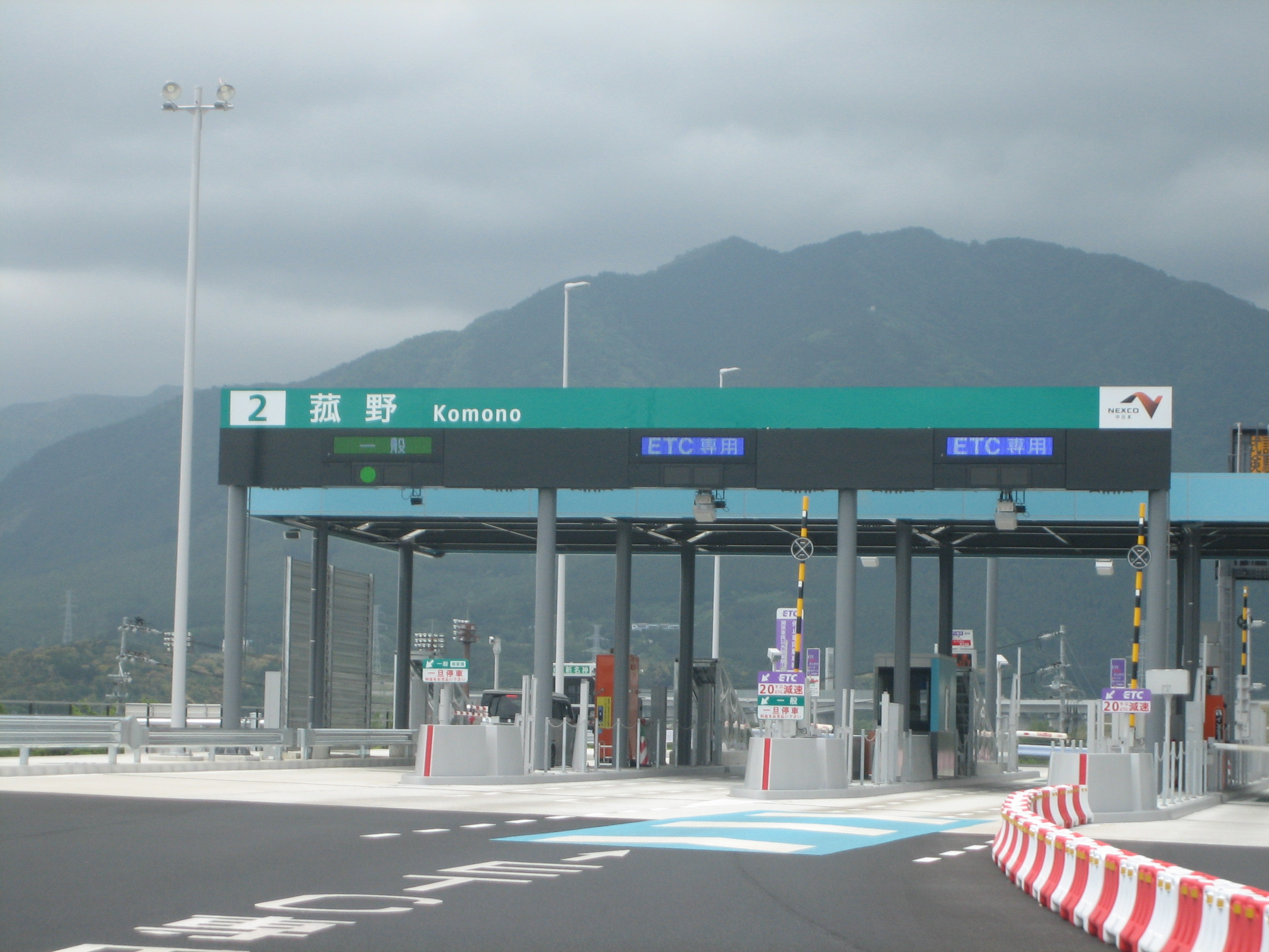 菰野ICの料金所